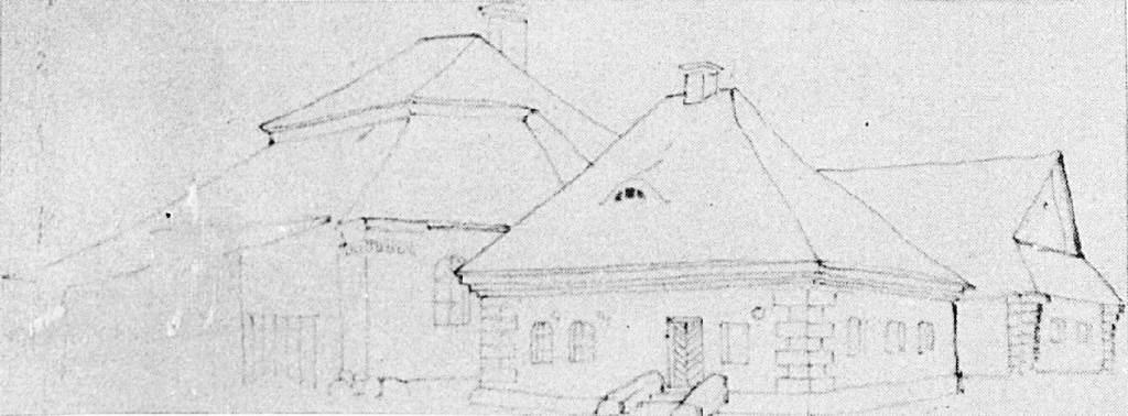 Беларуская (тарашкевіца): Нясьвіж